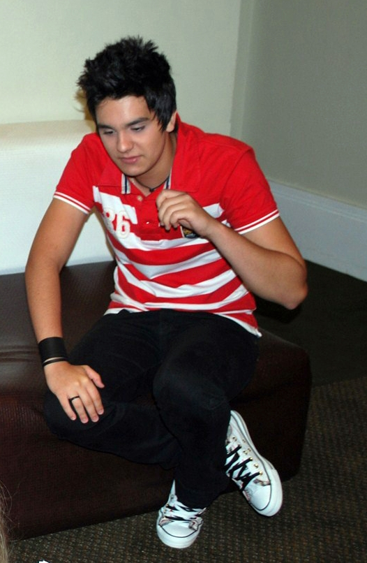 Luan Santana durante uma entrevista feita no Hotel Jequitimar durante o show de verão. Camera: Nikon D60 License on Flickr (2011-01-25): CC-BY-2.0 Flickr tags: Luan Santana, Jequitimar, Verão, SBT, Celso Portiolli, Ligia Mendes Cropped from original